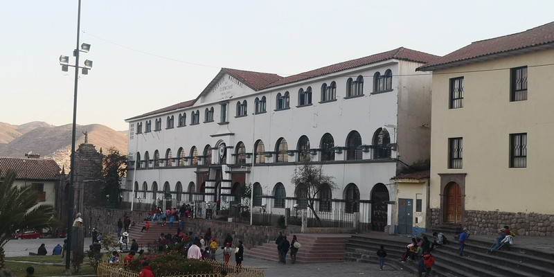 Frontis del Colegio Ciencias en el Cusco, Perú